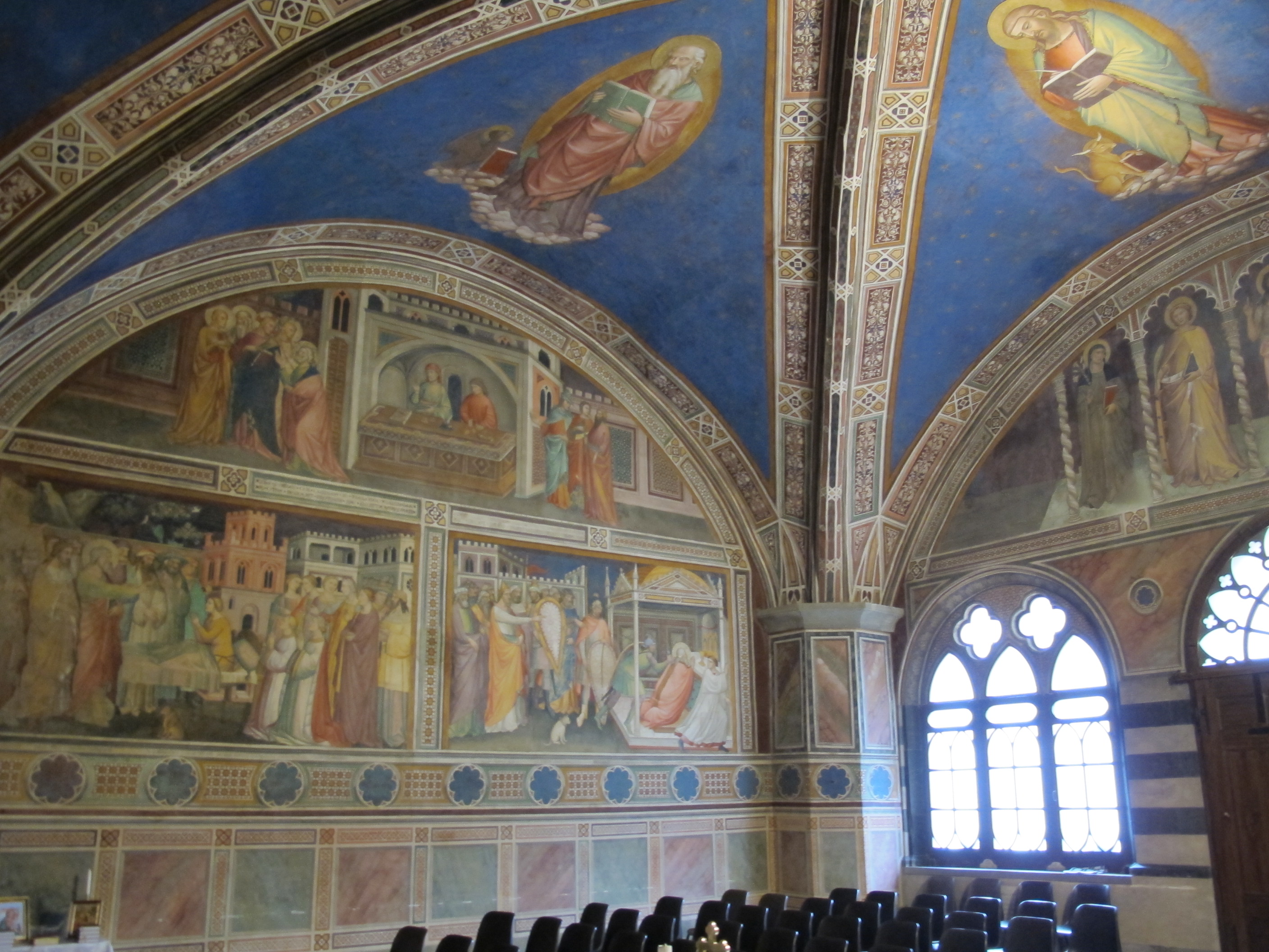 Cappella migliorati